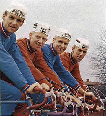 Fåglumbröderna